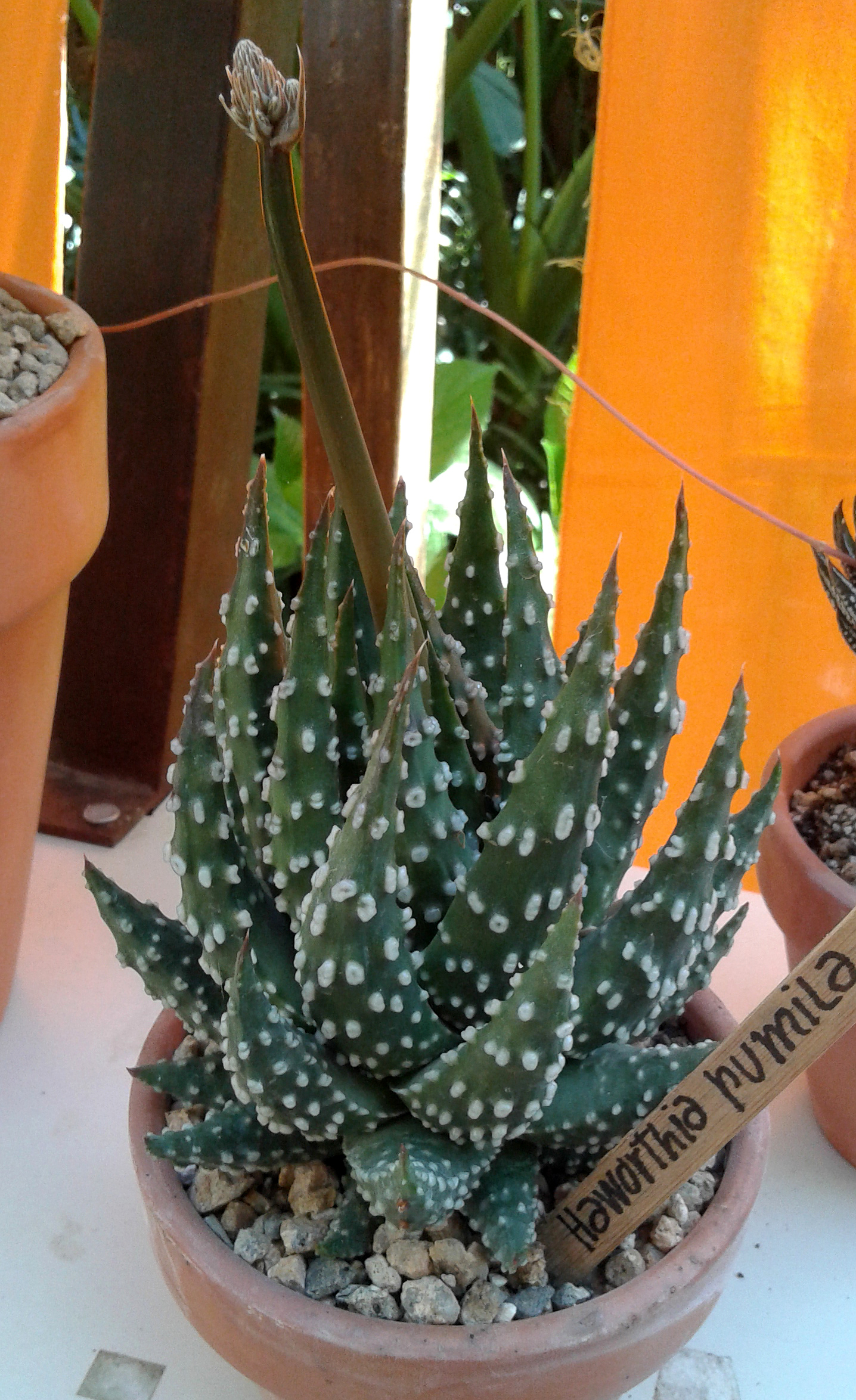 Haworthia pumila o Haworthia margaritifera.